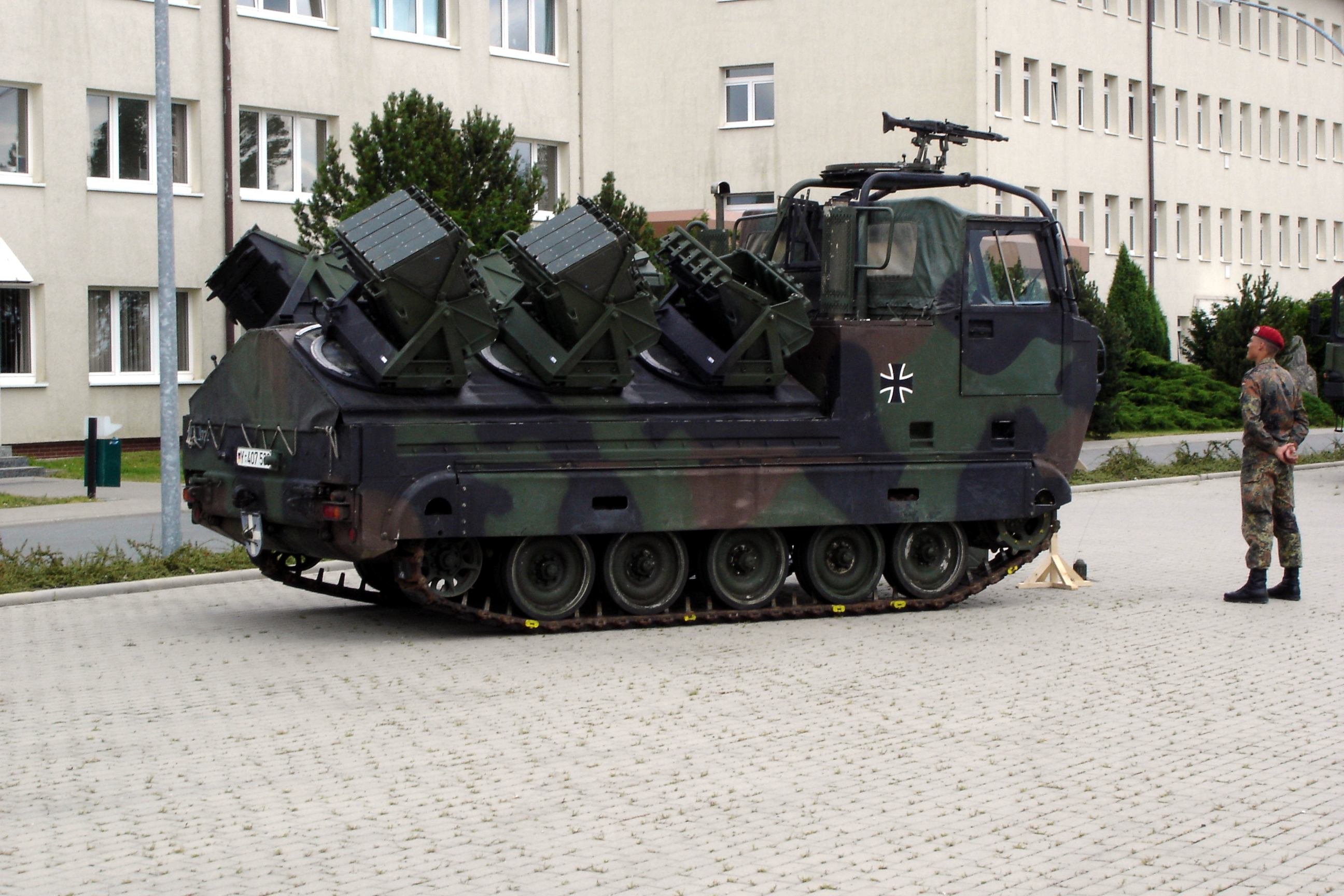 Minenwurfsystem "Skorpion" des 2./ PiBtl 722 in Gera (2004)